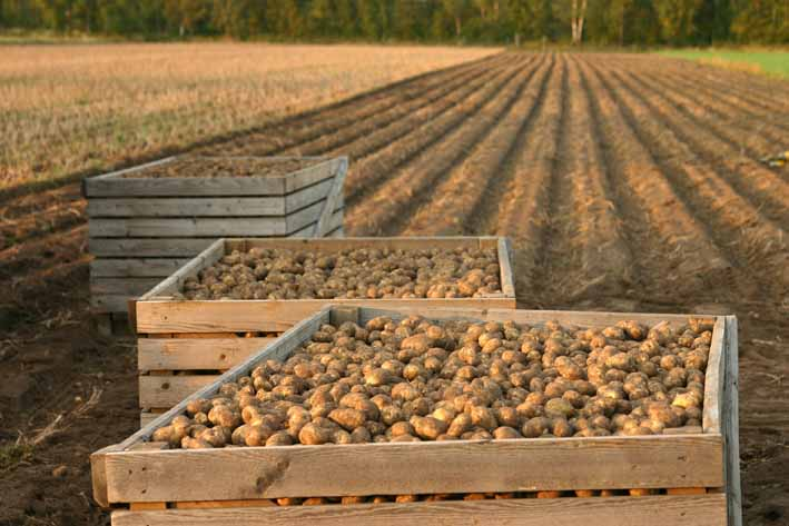 Amflora-Ernte im Feldversuchsanbau. Amflora ist die erste gentechnisch optimierte Pflanze, die seit 1998 in der EU eine kommerzielle Anbau-Zulassung erhalten hat. BASF-Forscher haben sie gemeinsam mit Experten der Stärkeindustrie entwickelt, um technische Anwendungen zu erleichtern.